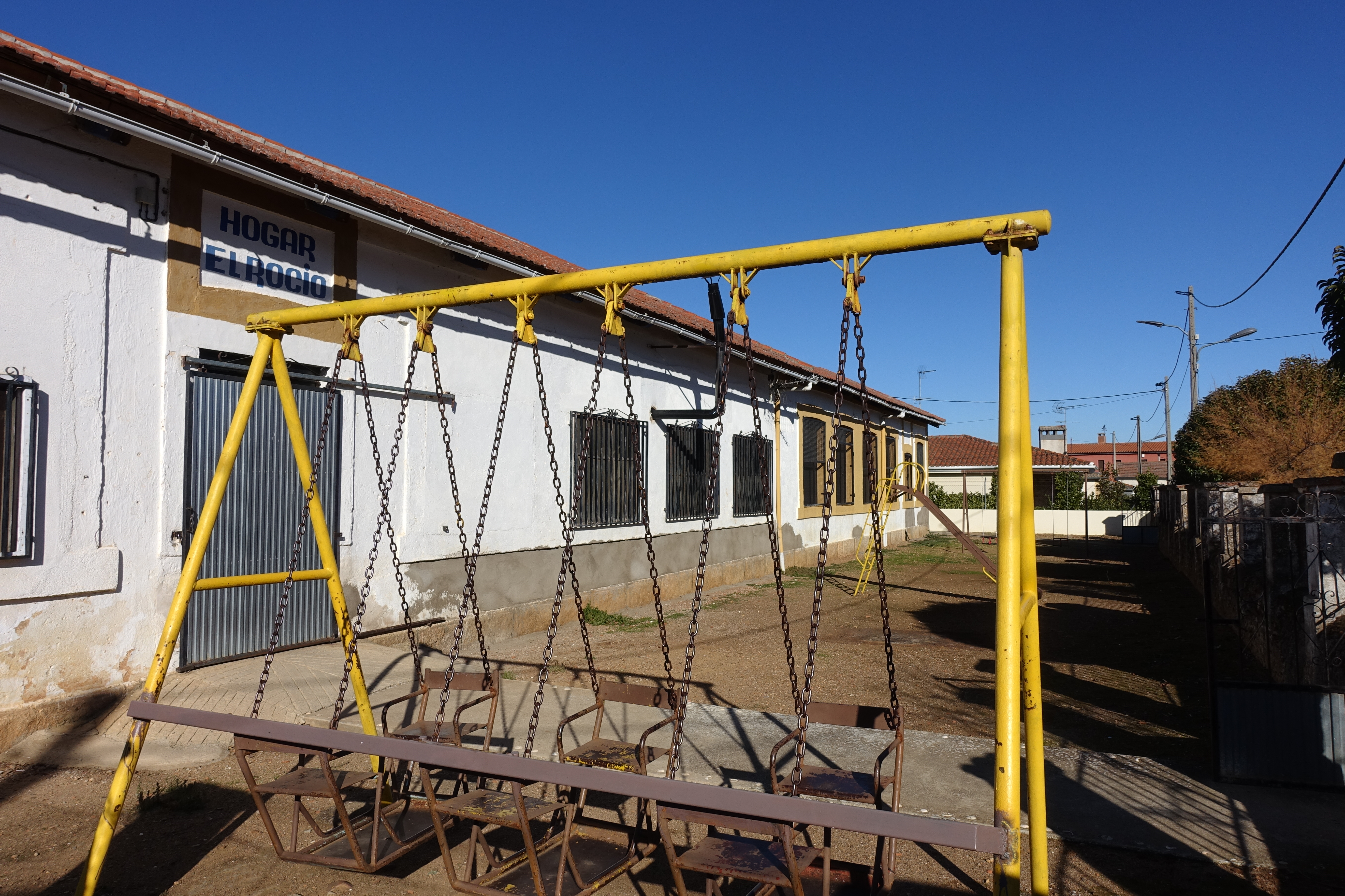 Antiguas escuelas de Sepulcro-Hilario (Salamanca, España).